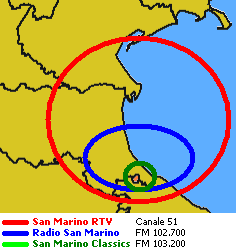 Frequencies map of San Marino RTV